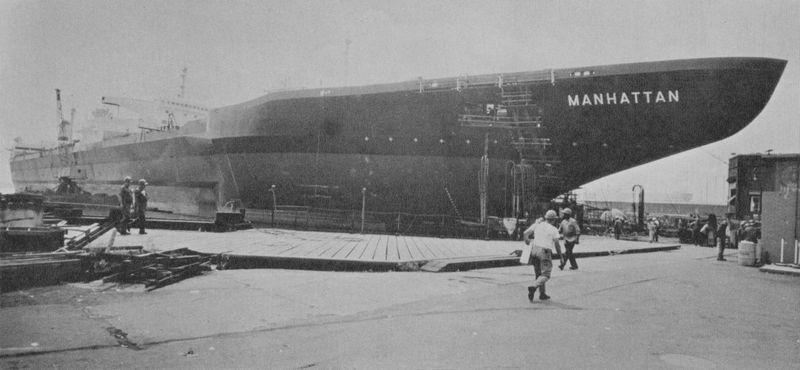 SS Manhattan